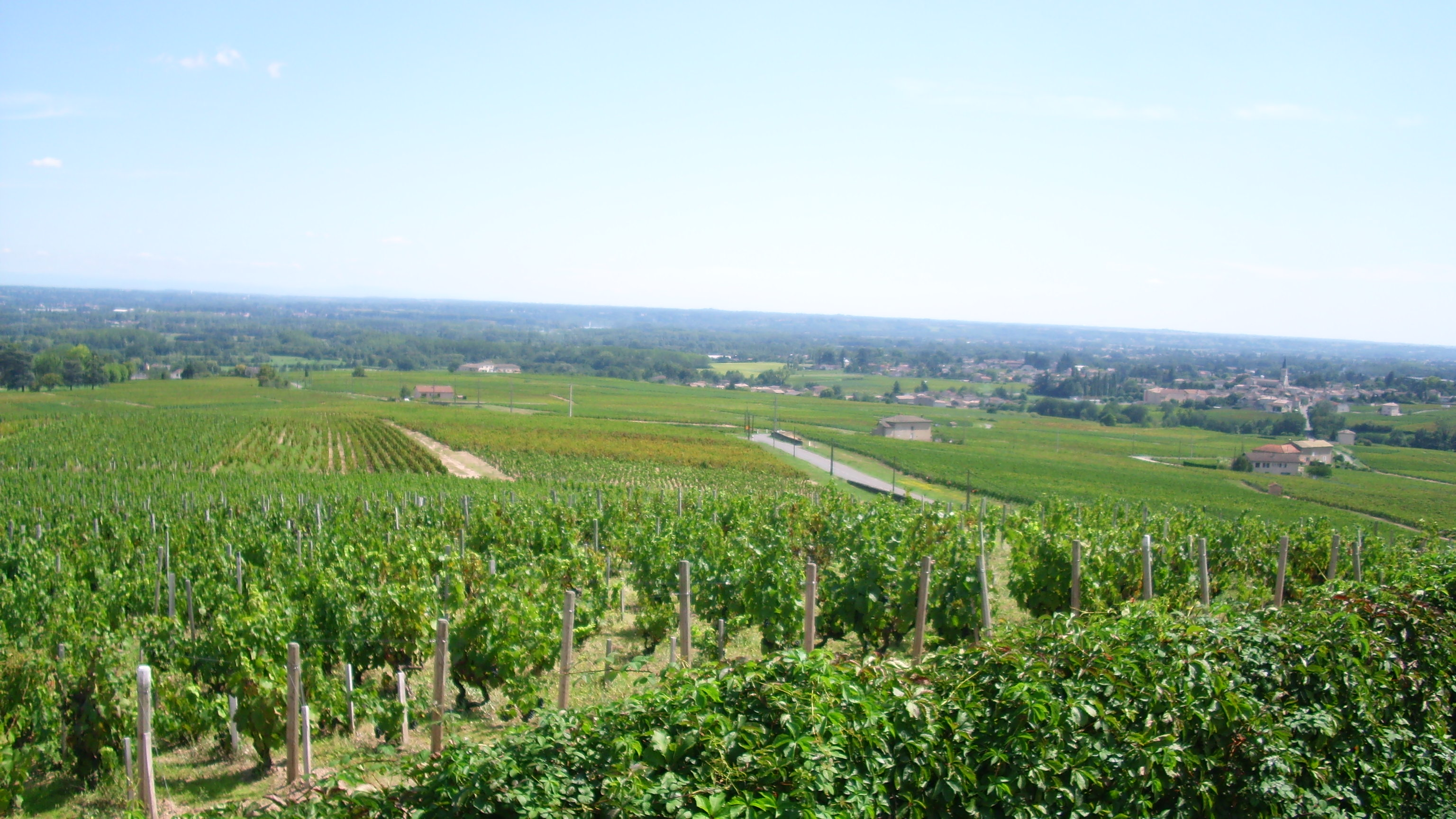 Vue d'une partie du vignoble de Moulin-à-Vent